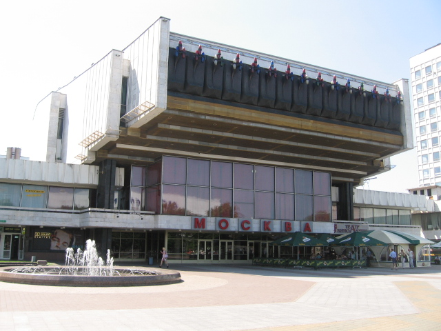 Кинотеатр москва, Минск